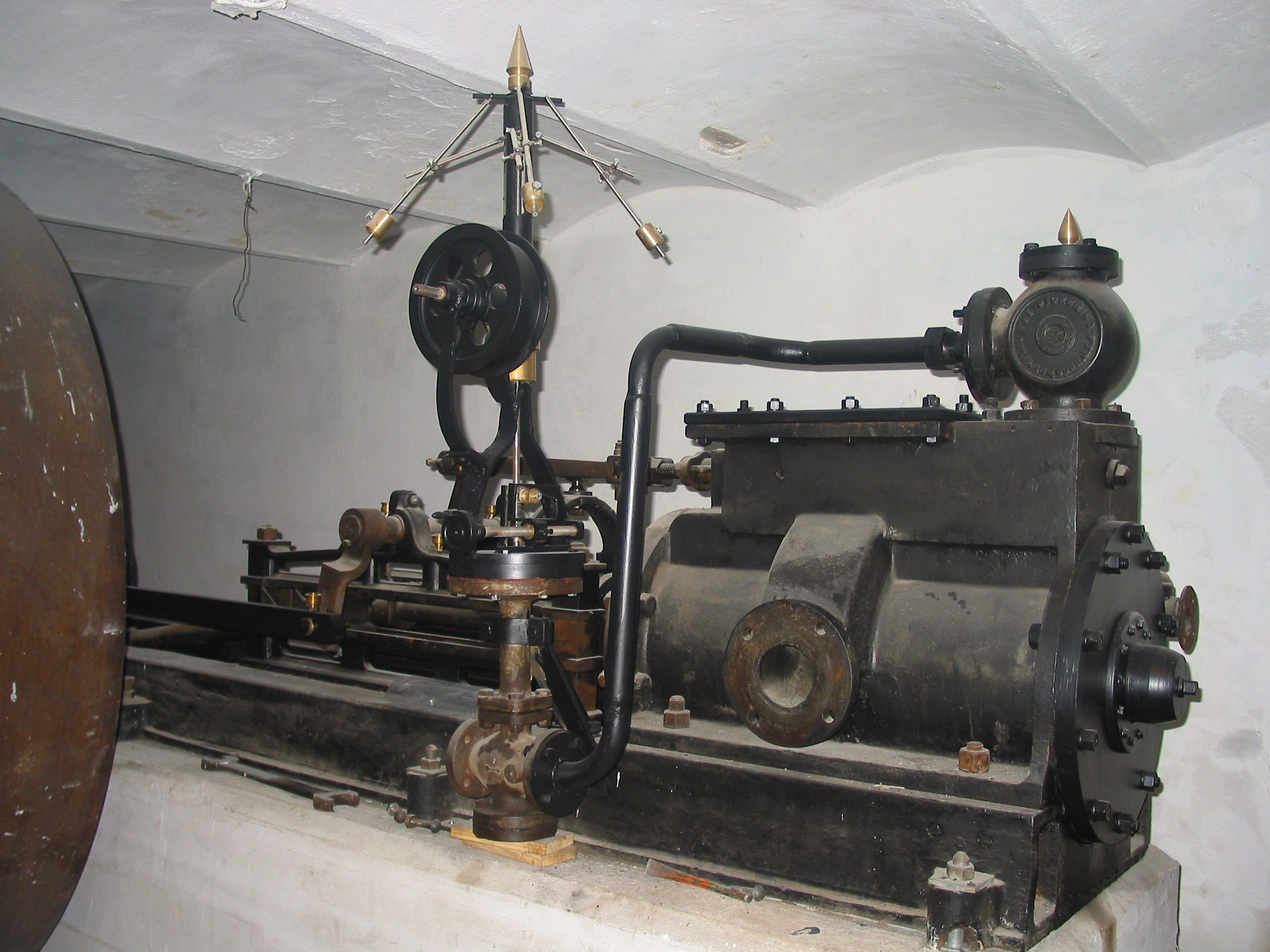 Dampmaskina ved Spillum Dampsag & Høvleri